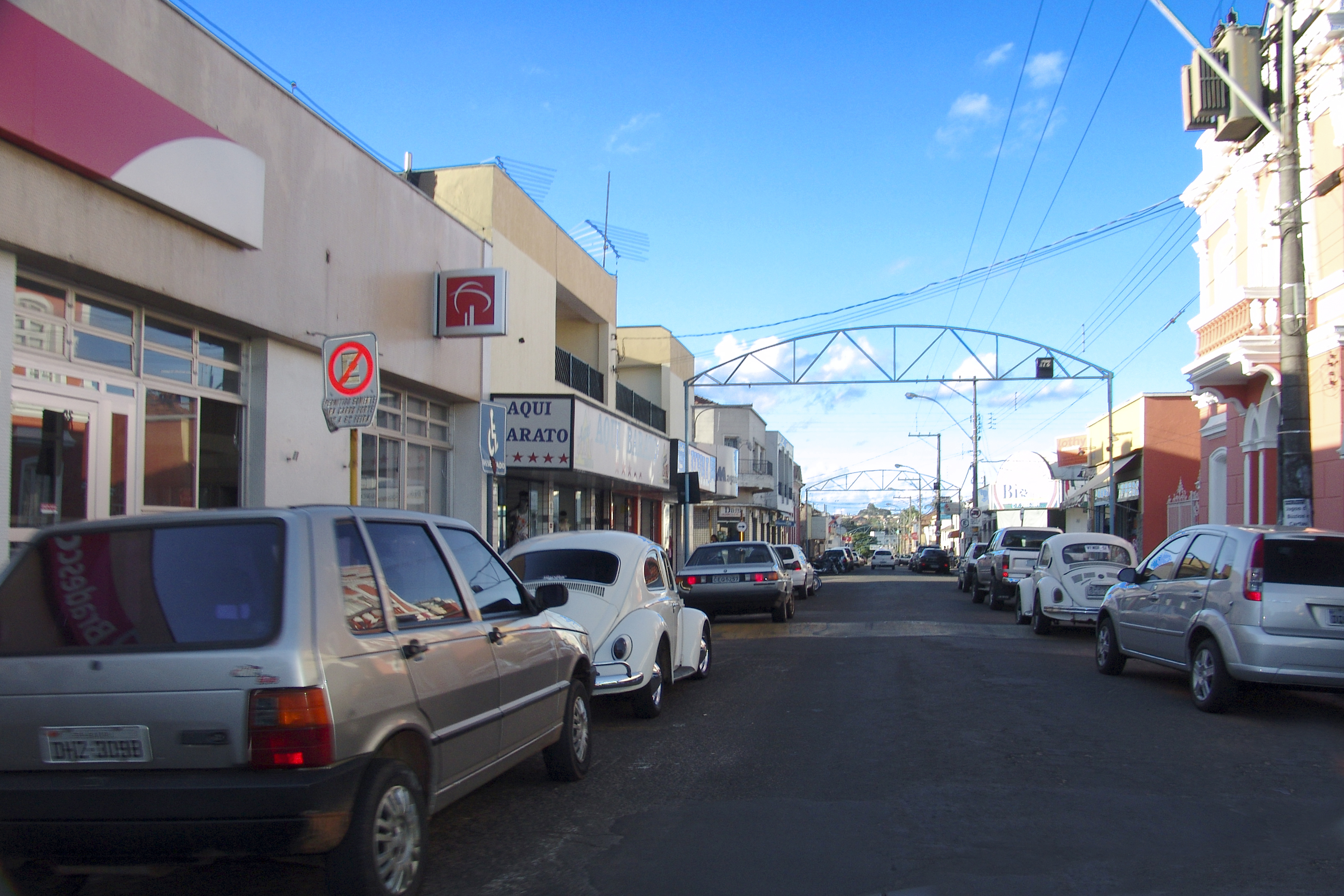 Vista geral de Agudos, município de São Paulo, Brasil